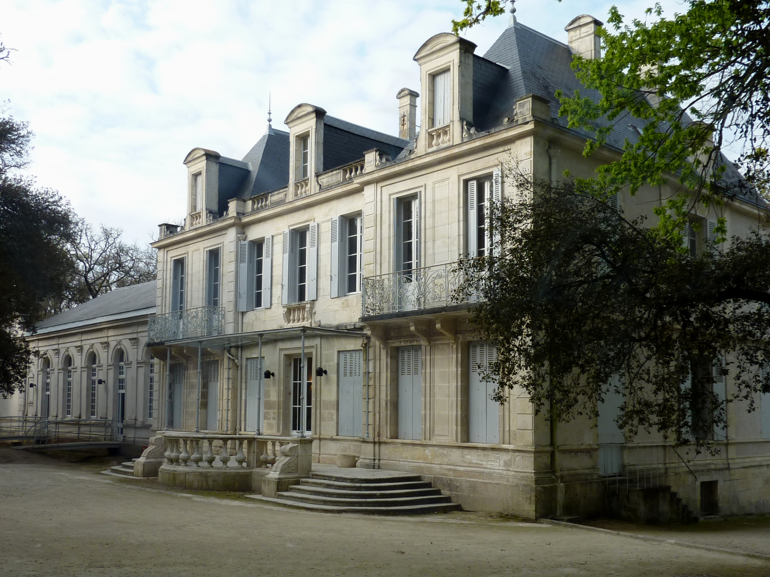 Château du Bois-vert Fouras Charente Maritime France